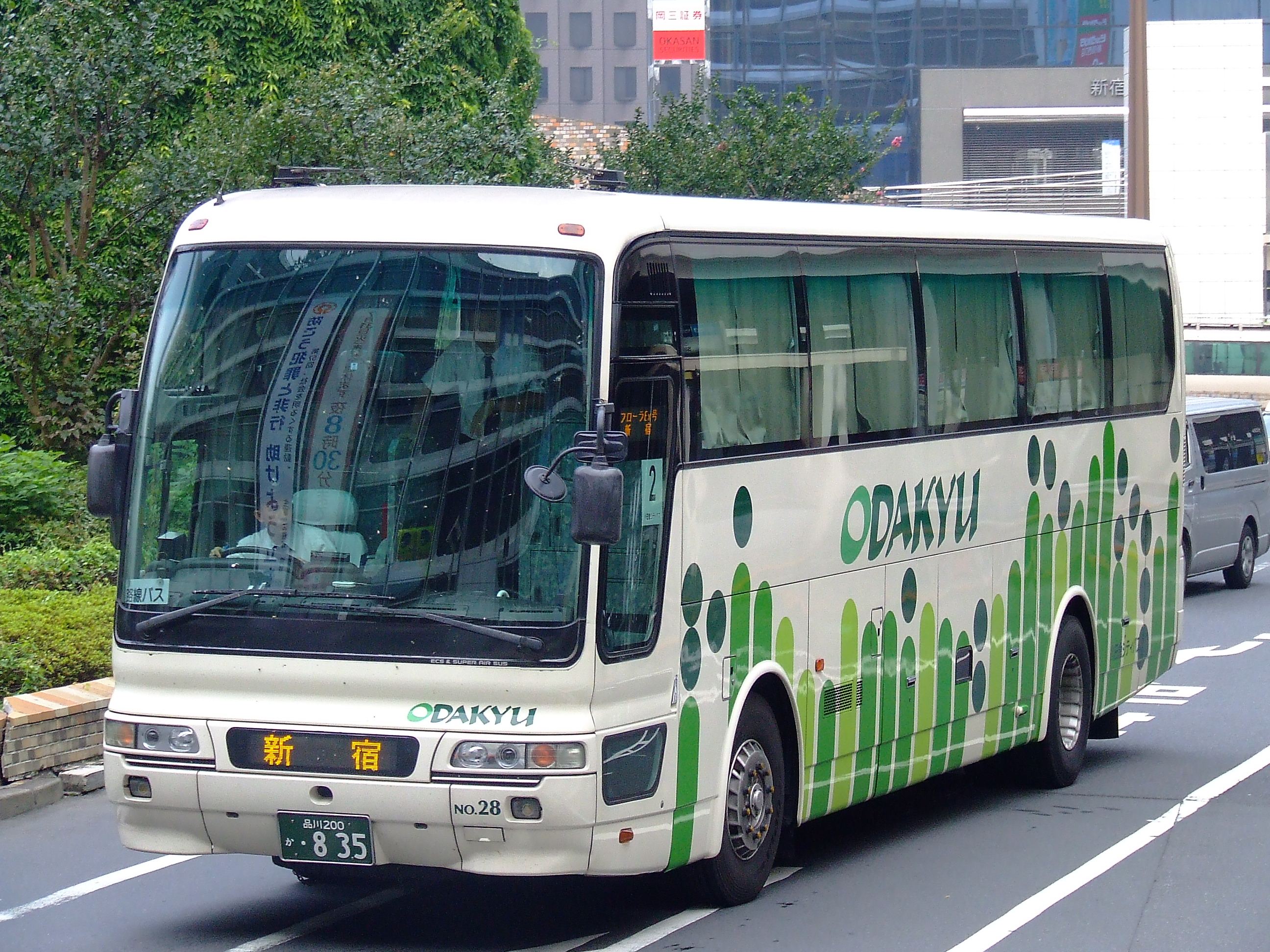 小田急シティバスの夜行高速バス「フローラEX号」新宿駅西口にて